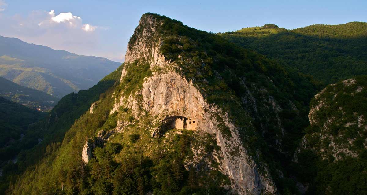 Panorama generale della Balma